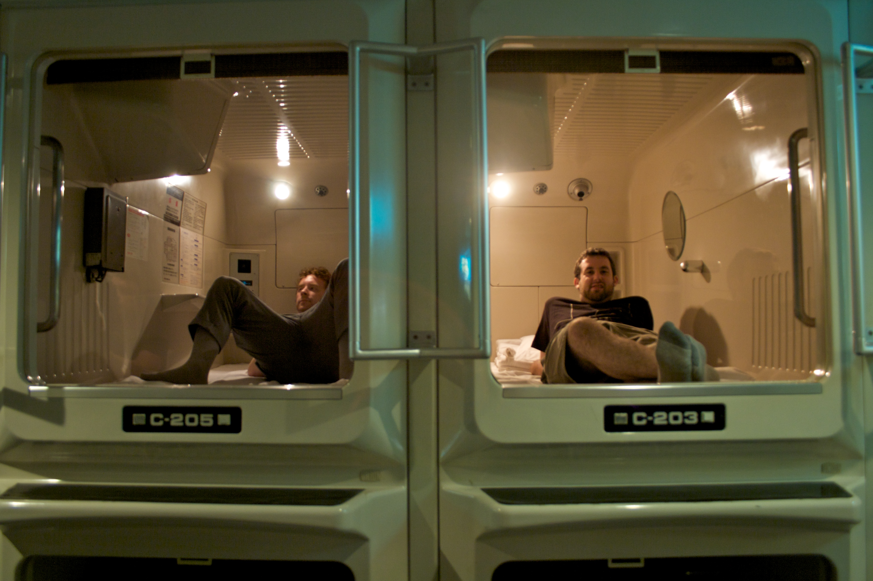 capsule hotel asahi plaza